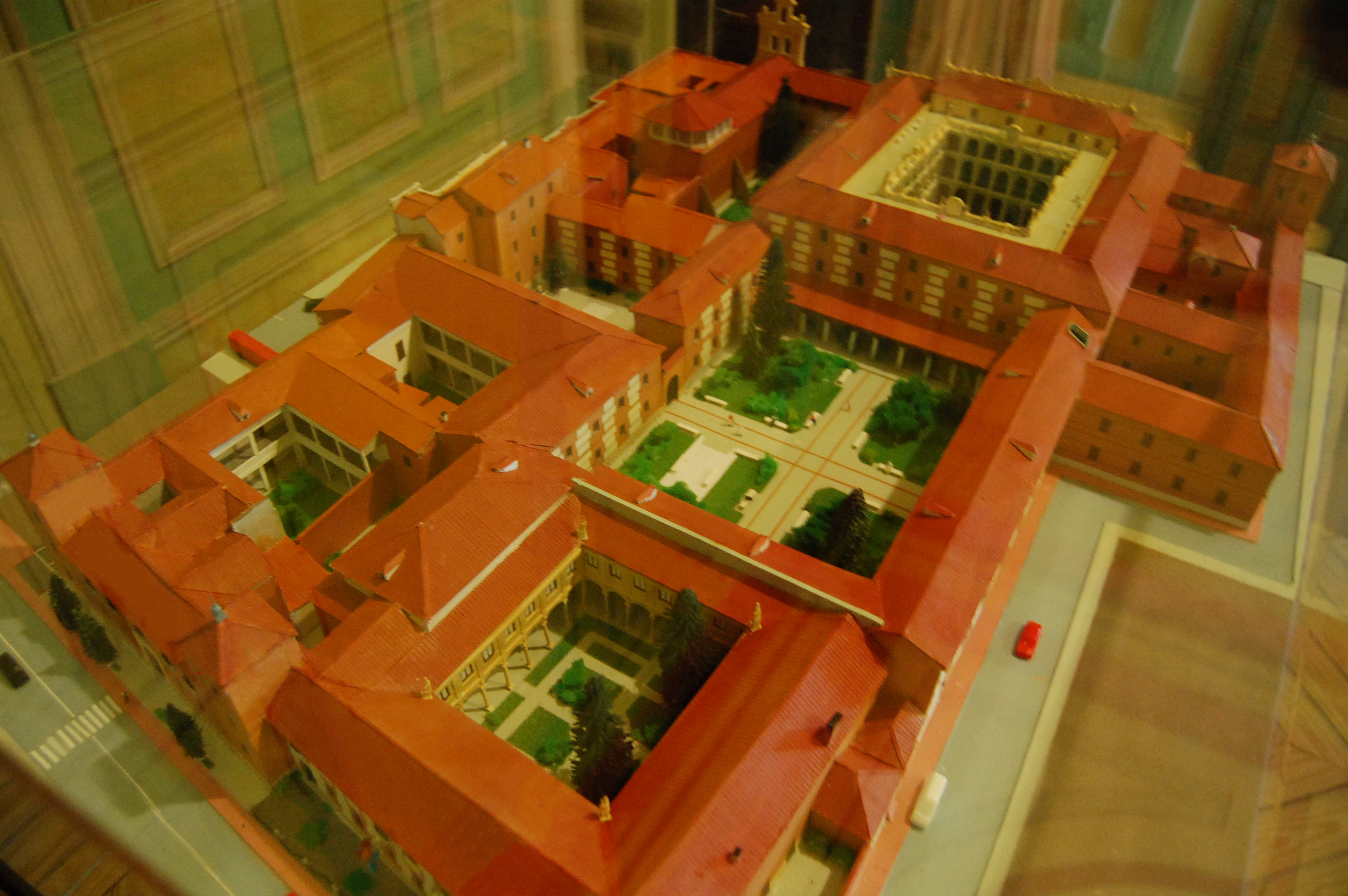 Maqueta de la Manzana Fundacional Cisneriana de la Universidad de Alcalá. Cuenta con 12 edificios construidos entre los siglos XVI al XX: [1] Colegio Mayor de San Ildefonso (actual Rectorado) Capilla de San Ildefonso Colegio menor de San Pedro y San Pablo (actual Gerencia de la Universidad) Colegio menor de San Jerónimo o Trilingüe Paraninfo de la Universidad Patio de Filósofos o Corral de Continuos Colegio menor de la Madre de Dios o de los Teólogos (actual Colegio de Abogados) Colegio menor de Santa Catalina o de los Artistas y Físicos Hospedería de Estudiantes del Colegio Mayor (actual sede de la Cruz Roja) Círculo de Contribuyentes o casino (del siglo XIX) Hotel Cervantes (del siglo XX) Edificio neo-mudéjar de la Plaza de Cervantes n.º 8.